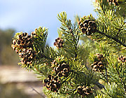 Pinyon-Kiefer Pinus edulis von Public Domain